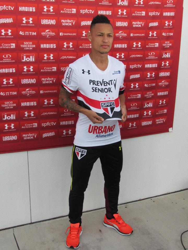 Neilton Meira Mestzk